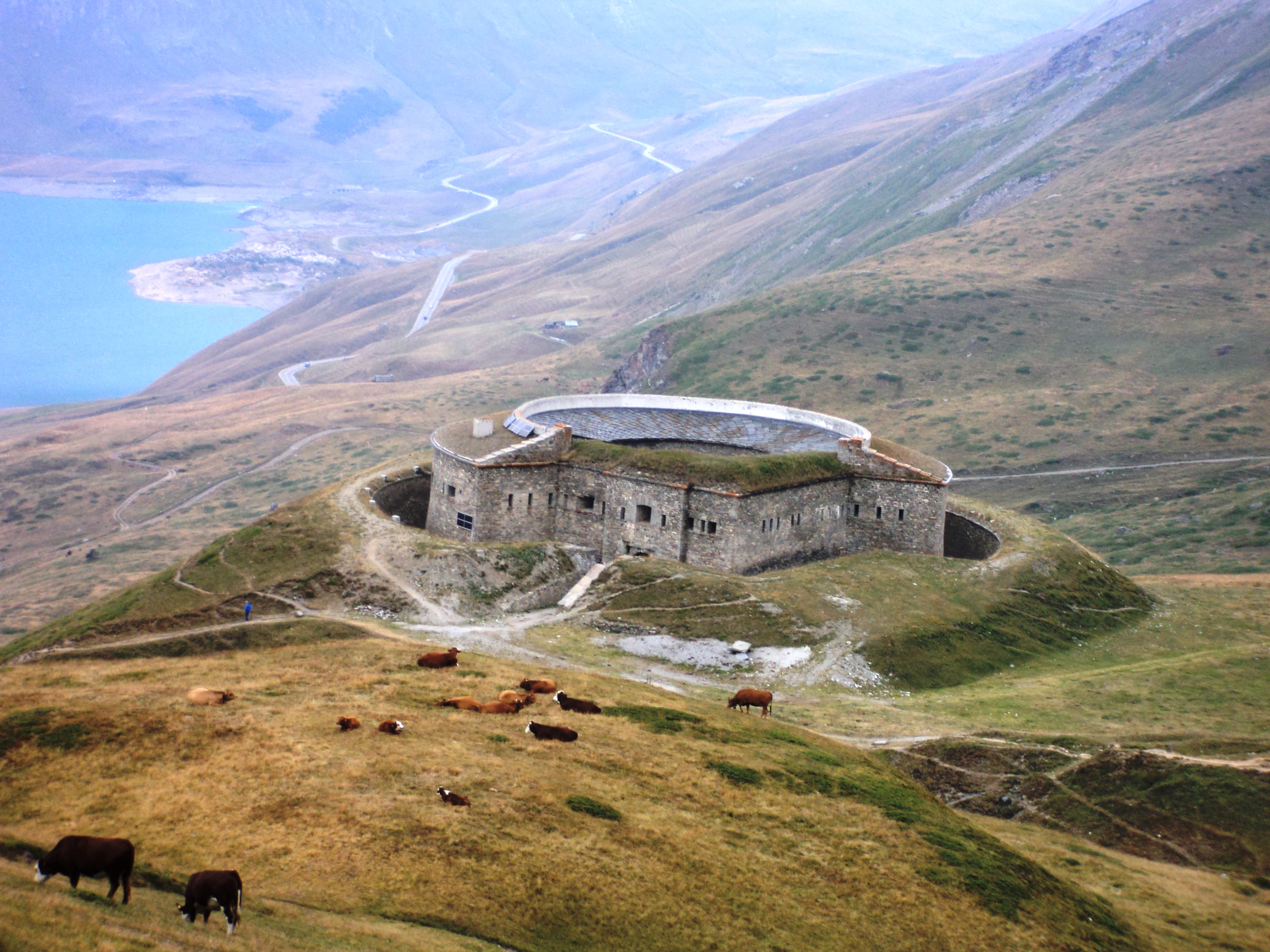 Il Forte Roncia sopra il Lago del Moncenisio